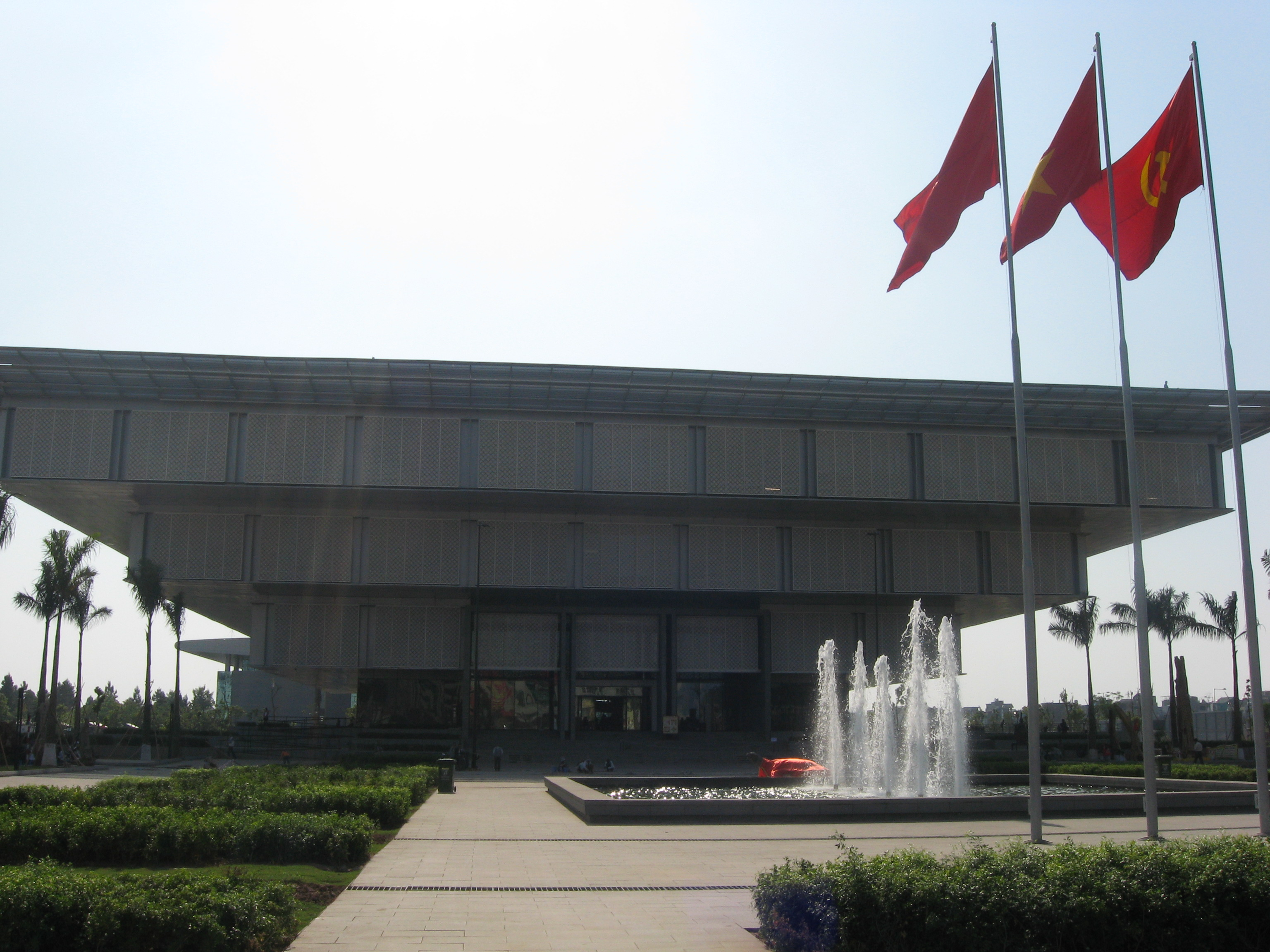 Hanoi Museum, Hanoi, Vietnam